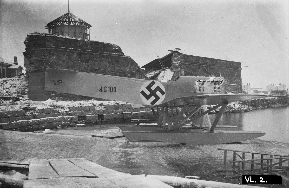 Somijā ražotā Latvijas gaisa spēku lidmašīna I.V.L. A.22 Hansa.